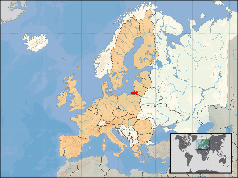 mapa de Kaliningrado en europa